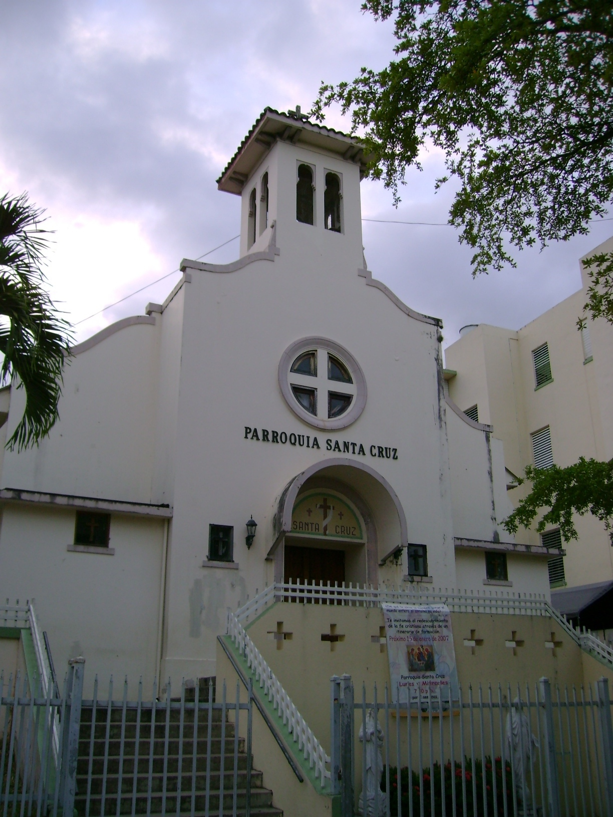 Parroquia Santa Cruz en el pueblo de Trujillo Alto, Puerto Rico.